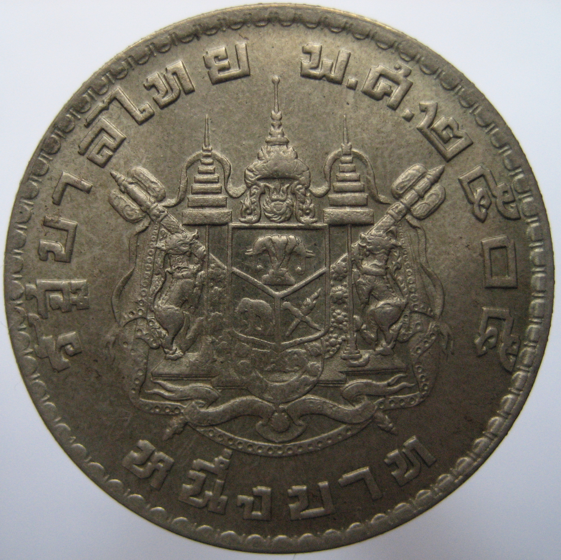 1 бат 1962 года, Таиланд, реверс.